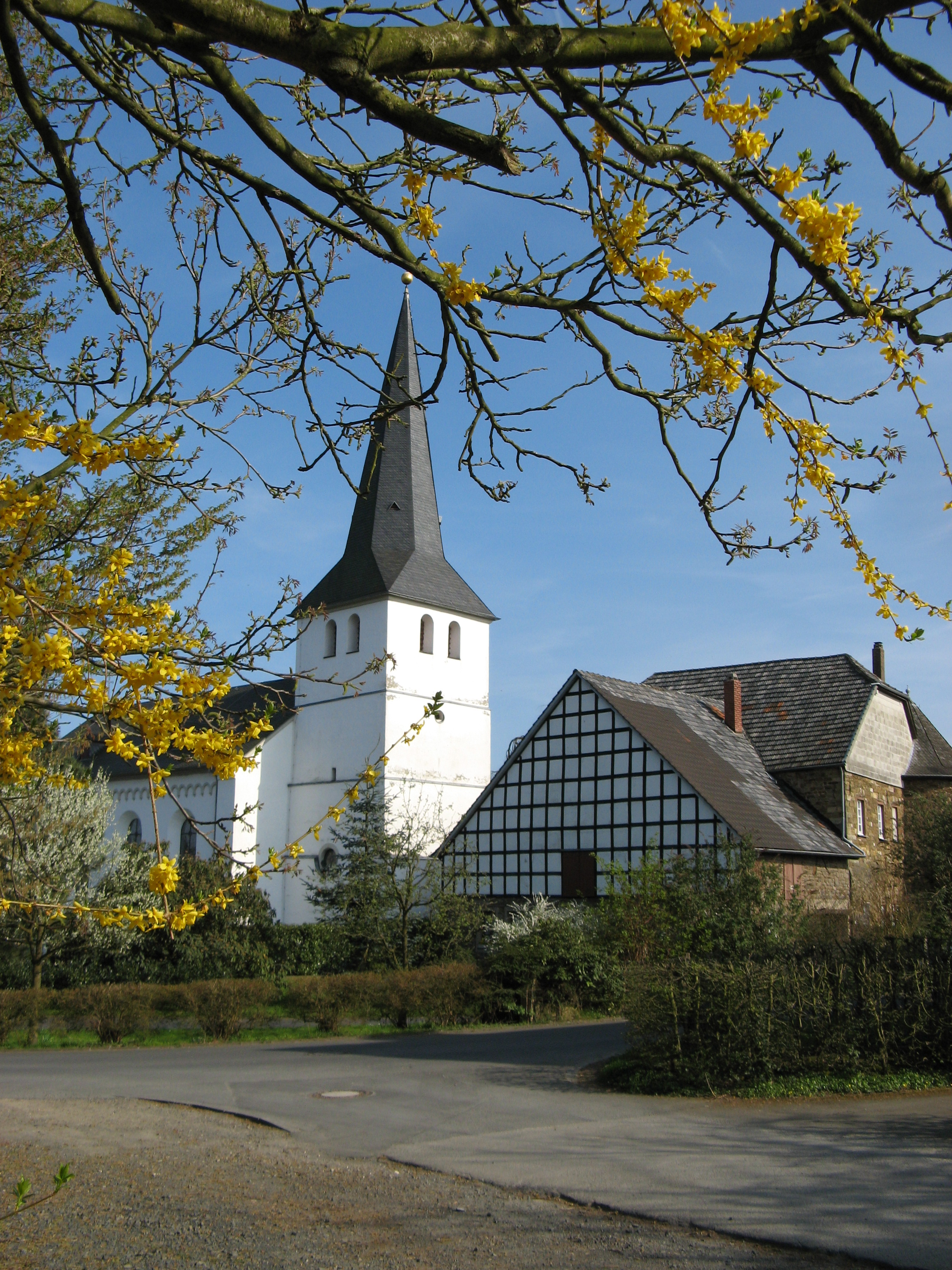 Ortskern von Honrath (Stadt Lohmar) mit evangelischer Kirche ursprünglich romanisch aus dem 12. bis 13. Jahrhundert, Turm 17. Jahrhundert, Turmhelm 1895 und Langhaus 1856/57